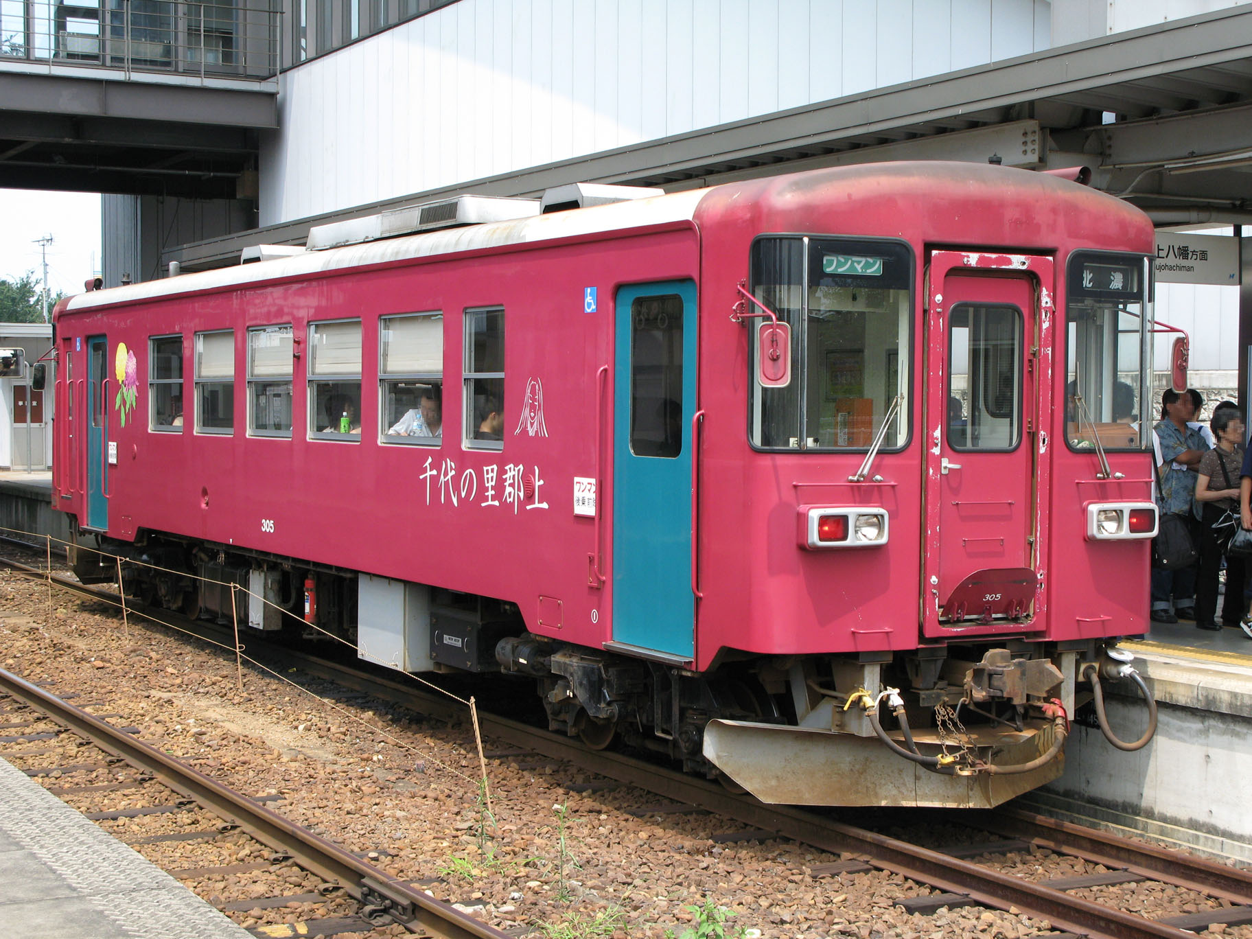 長良川鉄道ナガラ3形305号 2007年8月撮影。 機材：PowerShot G7 撮影者：Kansai explorer 撮影後レタッチ・リサイズ